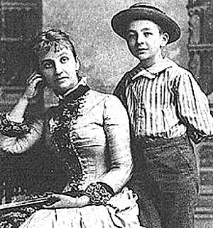 Варвара Николаевна Мак-Гахан (1850 - 1904) - русская и американская журналистка.